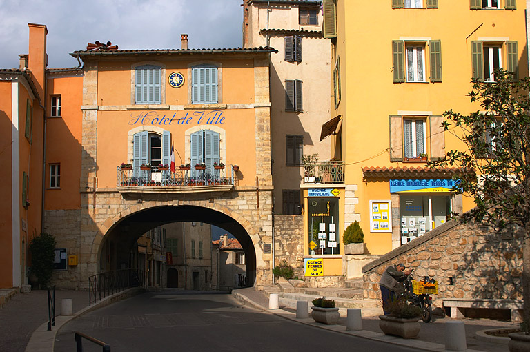 Située à flanc de colline dans l'arrière-pays varois, Fayence est à l'orée de la Provence et de la Côte d'Azur. Particulièrement appréciée par les touristes, la bourgade accueille le premier centre de vol à voile d'Europe.